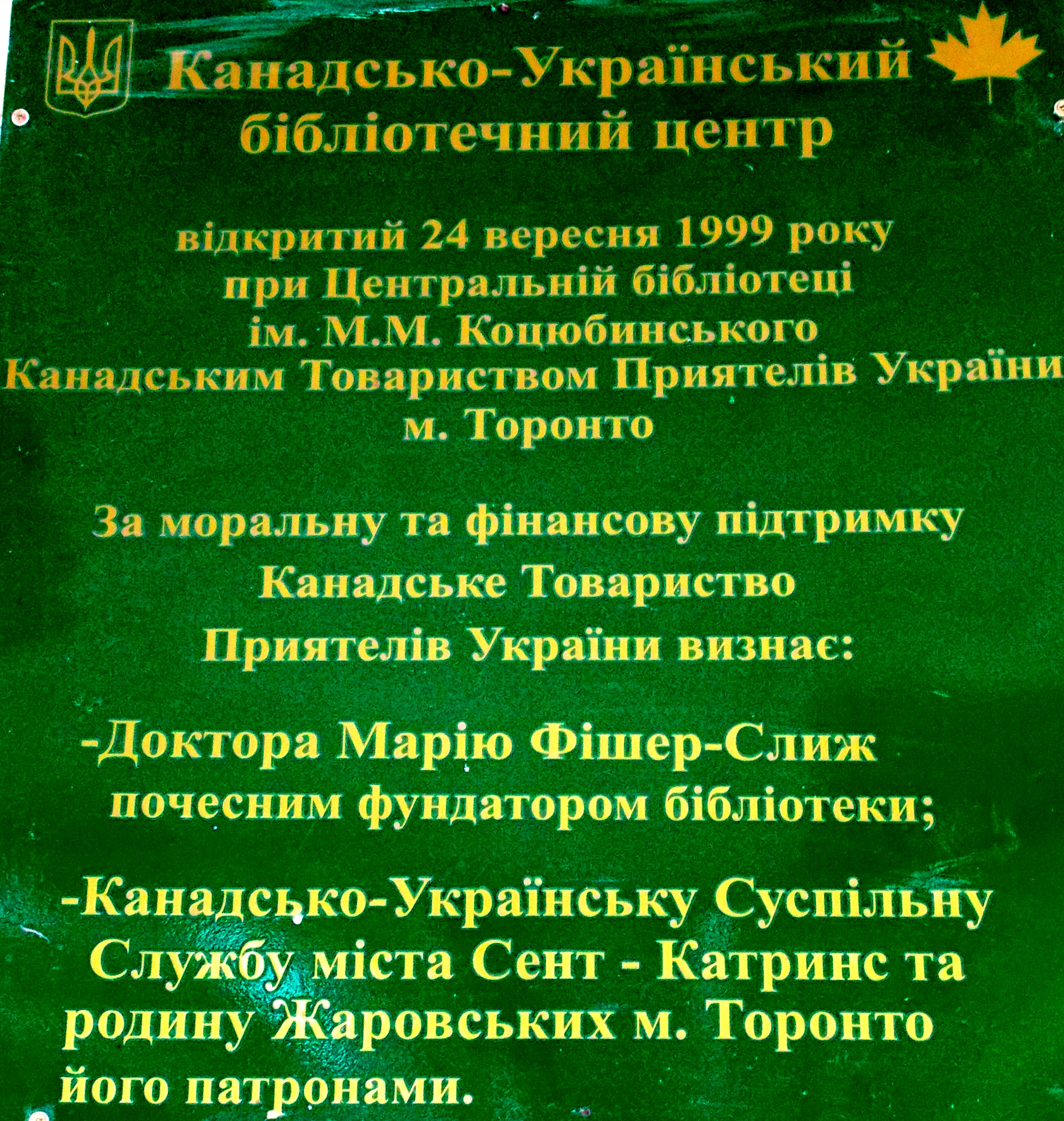 Вивіска Канадсько-Українського бібліотечного центру в Чернігові